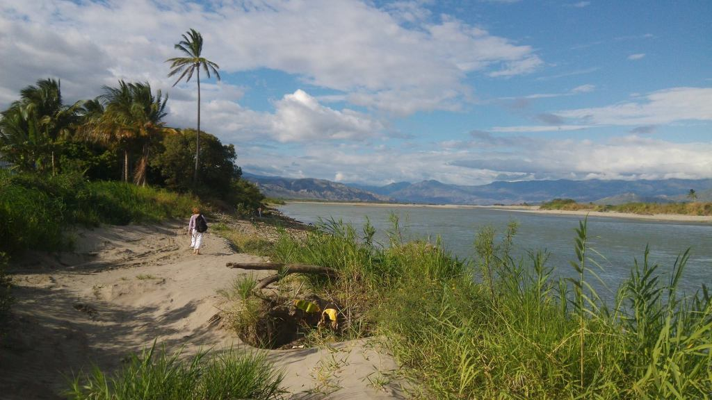 plage de Bella vista